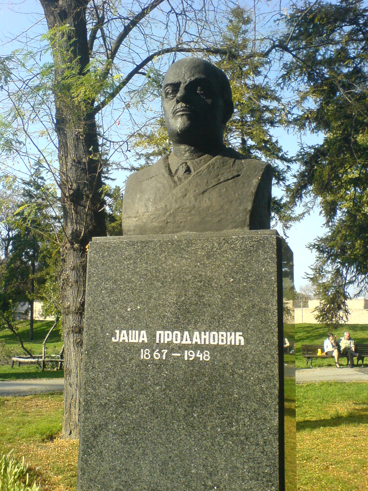 Споменик Јаши Продановићу на Калемегдану